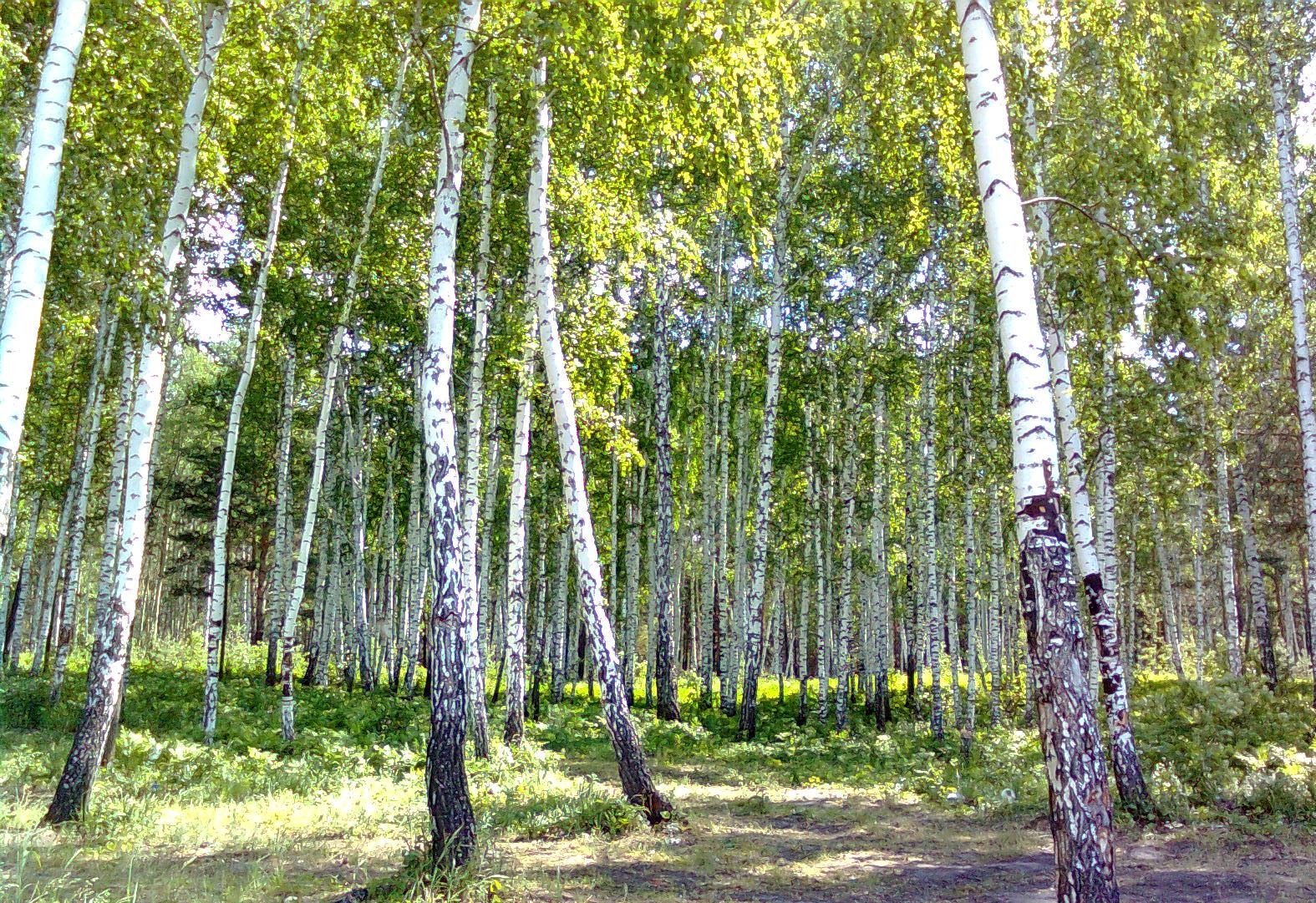 Сингульский лес, Ялуторовский район This image is related to the protected area of Russia number 7210157